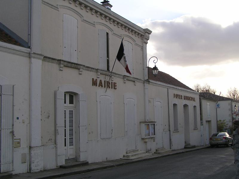 mairie de Macqueville